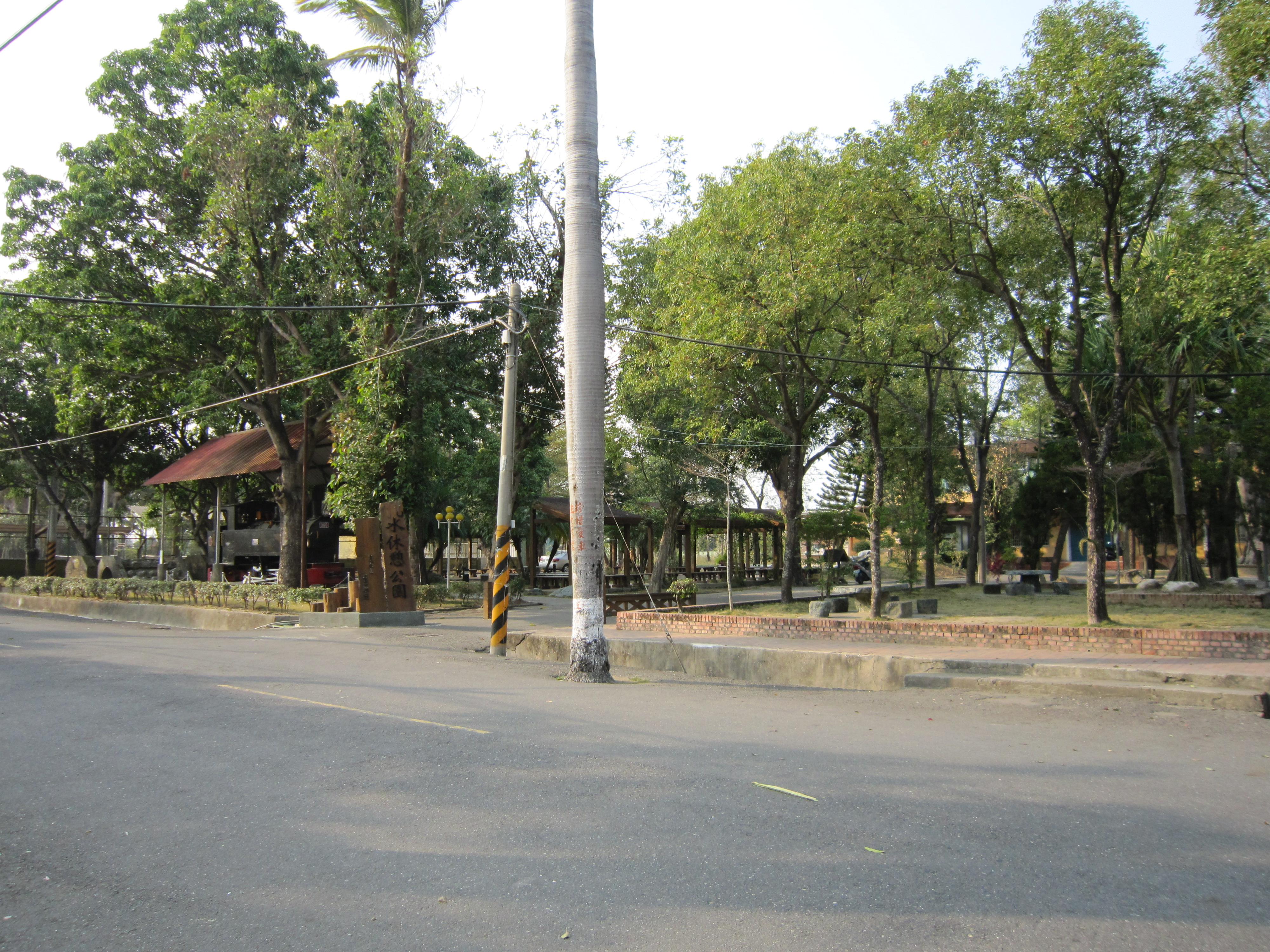 善化糖廠親水休憩公園